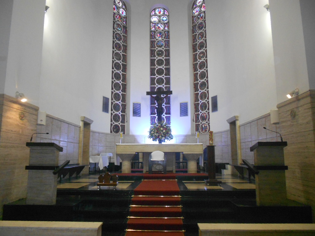 Interior da Igreja da Santíssima Trindade, situado na Rua Senador Vergueiro, no Flamengo, Rio de Janeiro, Brasil.